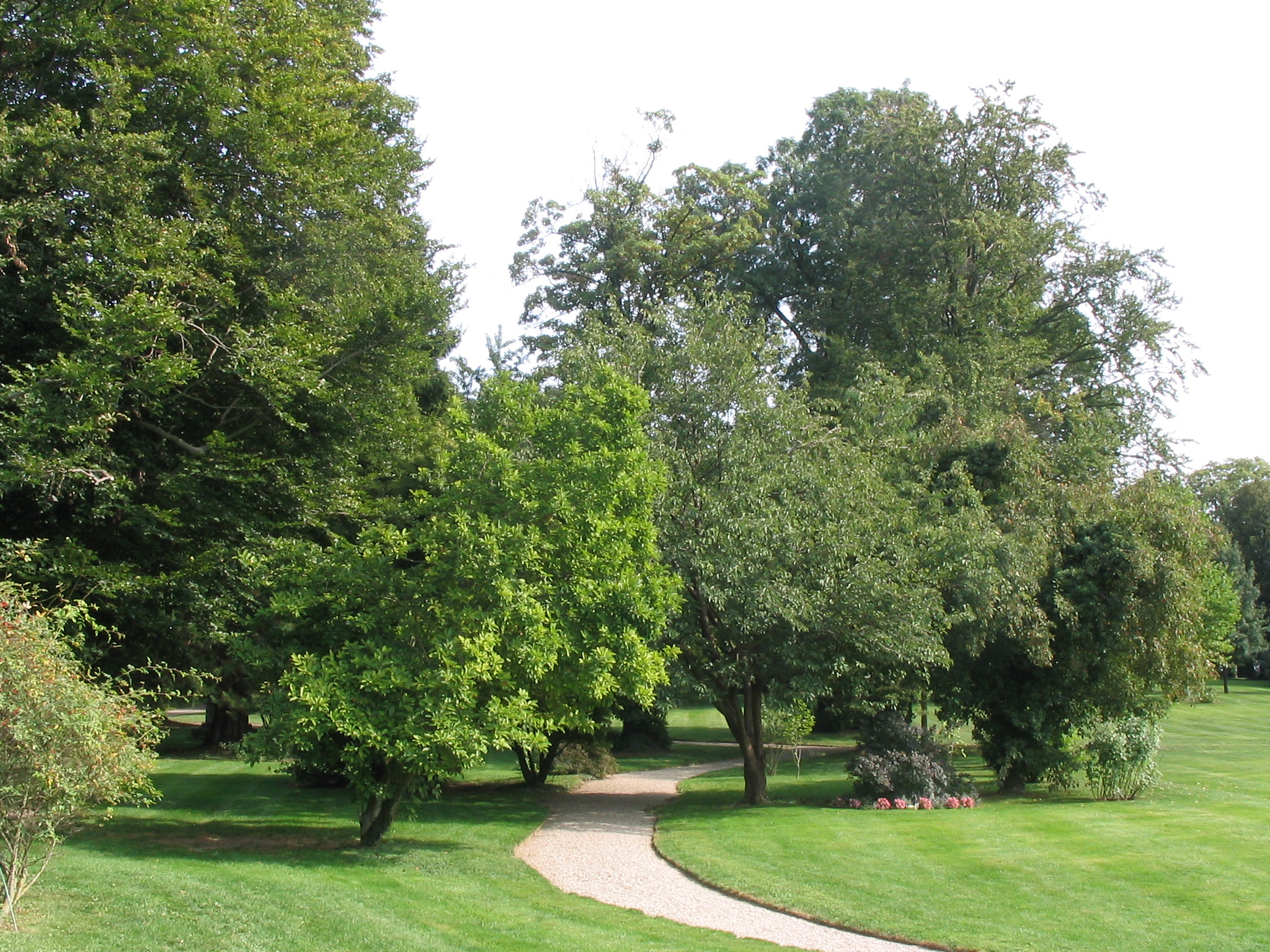 Schlossgarten Nippenburg